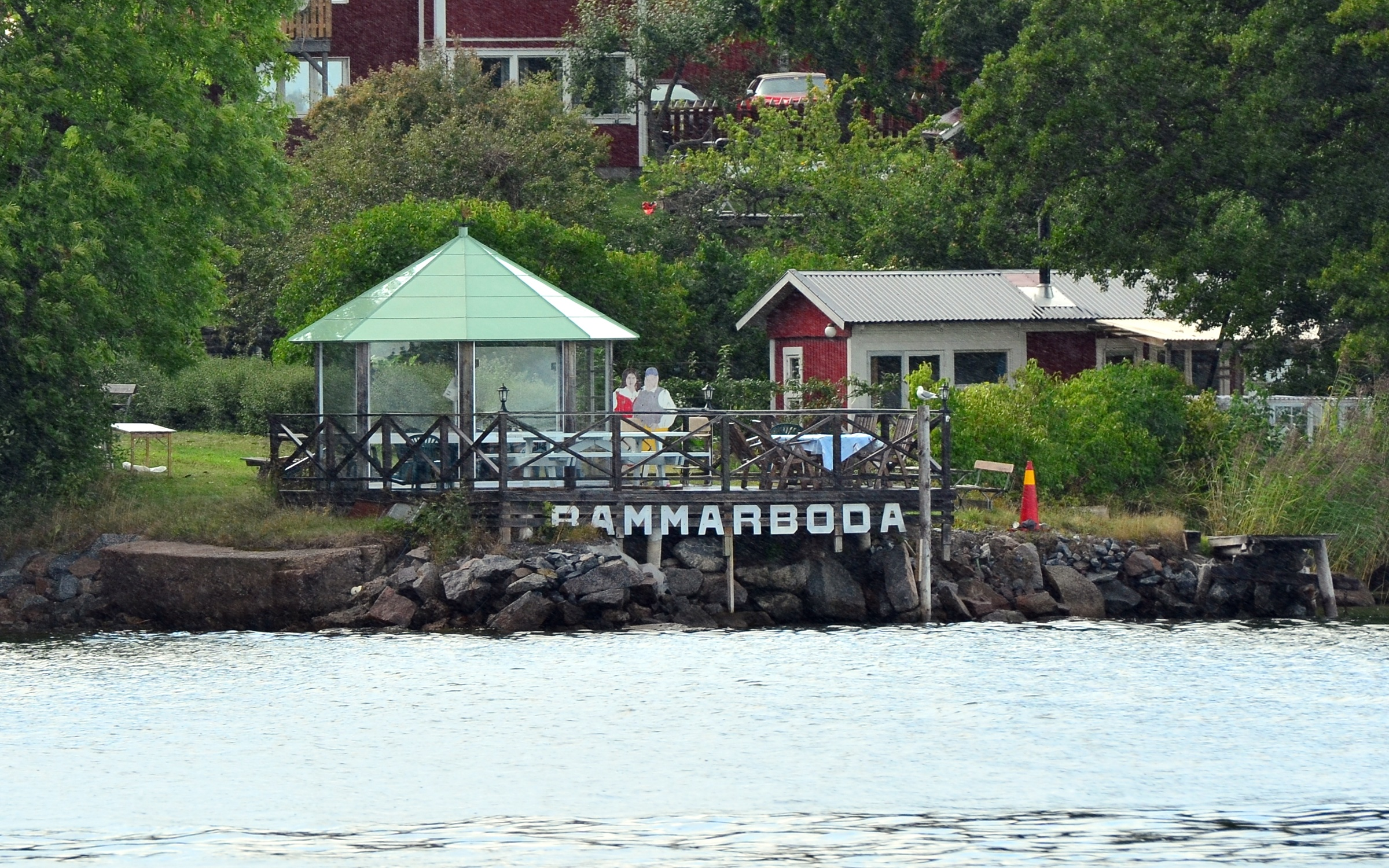 En brygga i Bammarboda, Österåkers kommun